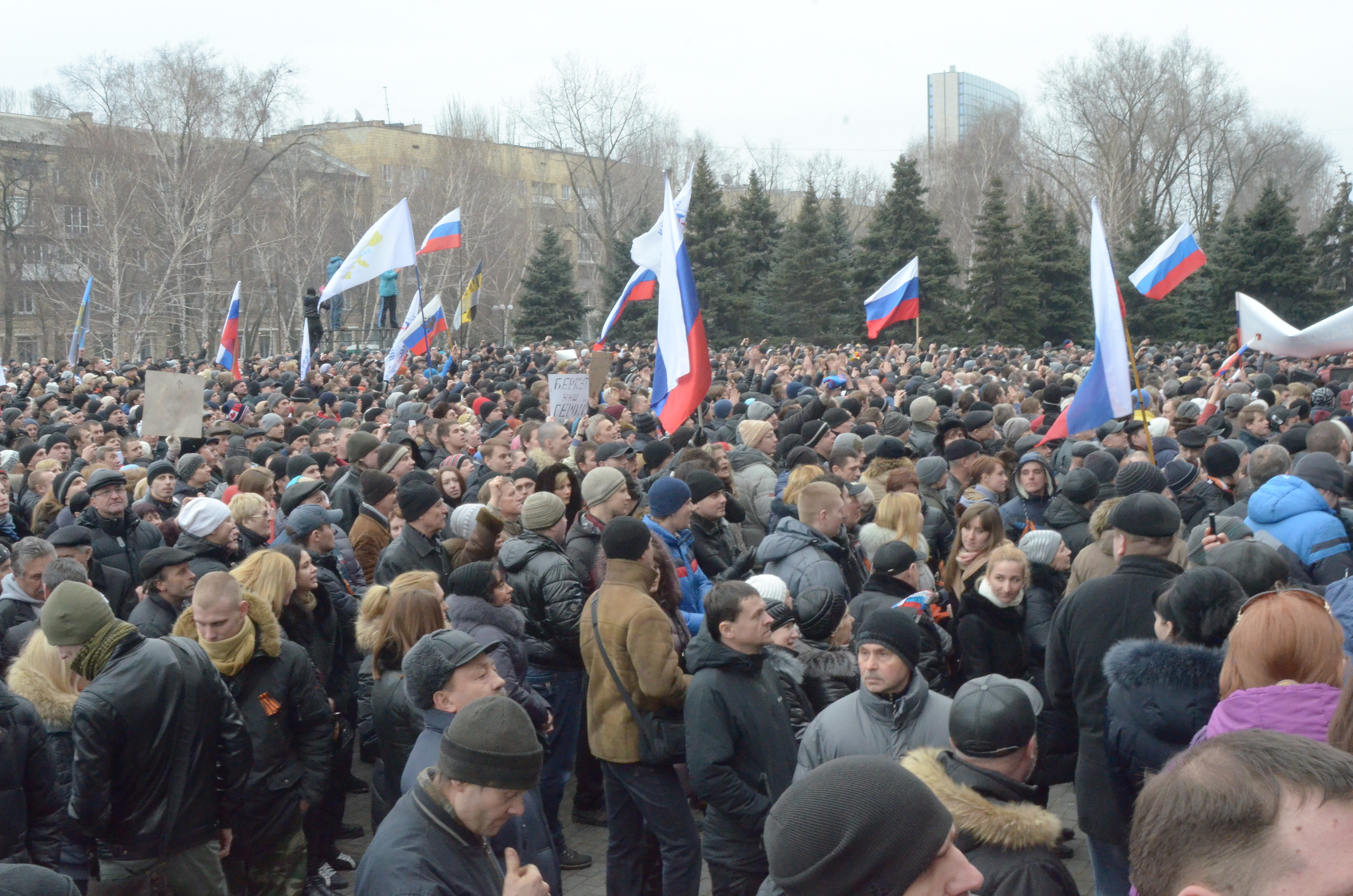 Митинг в Донецке